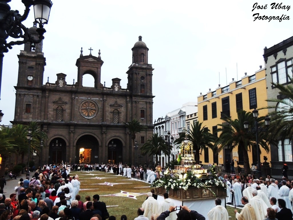 Celebración del Corpus Christi en la ciudad de Las Palmas de Gran Canaria, isla de Gran Canaria. Diócesis de Canarias.